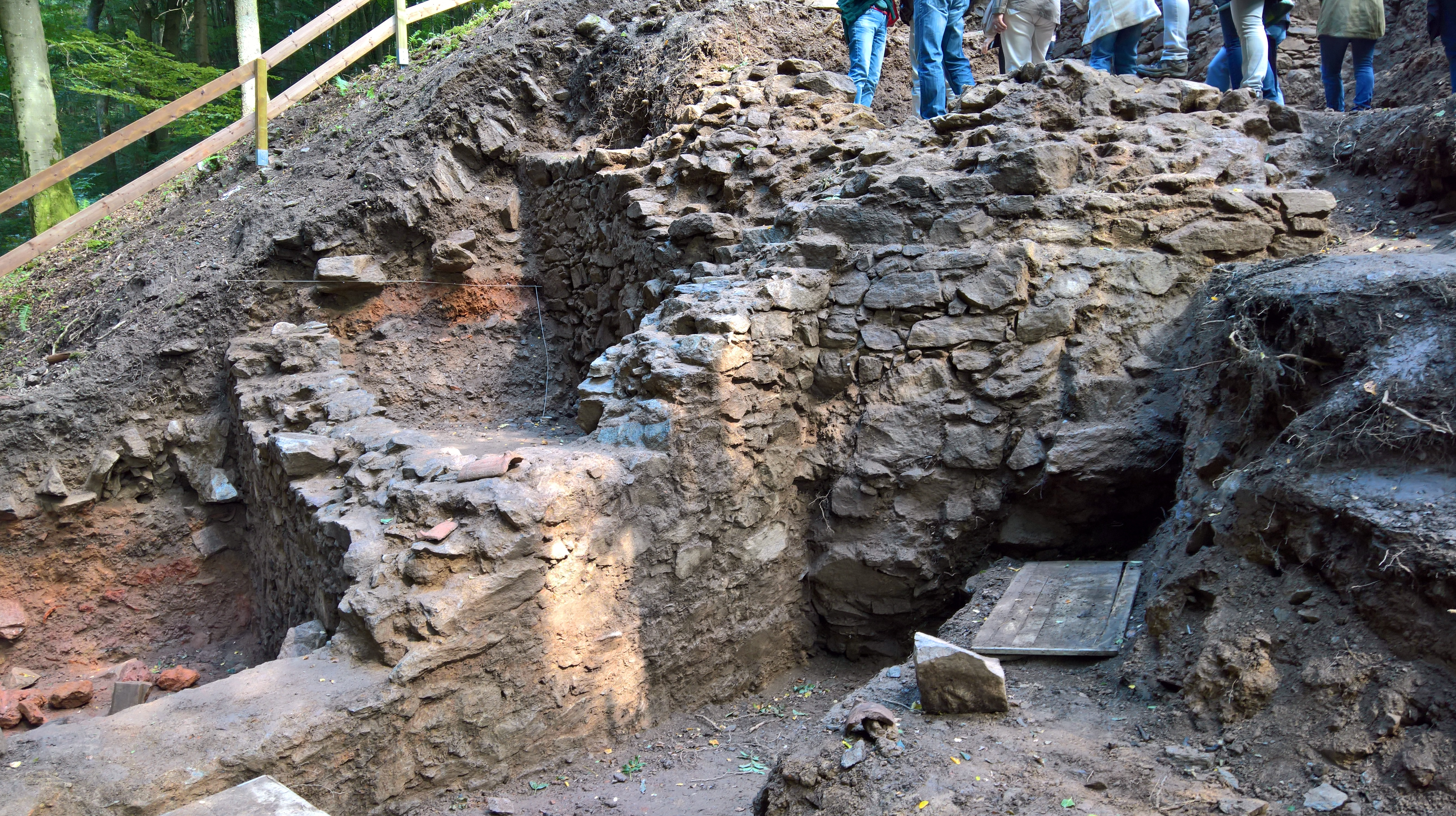 Ausgrabungsschnitt mit innerer Mauer (im Bild rechts) Zwinger und Gebäuderest an der Burgmauer (links im Bild)